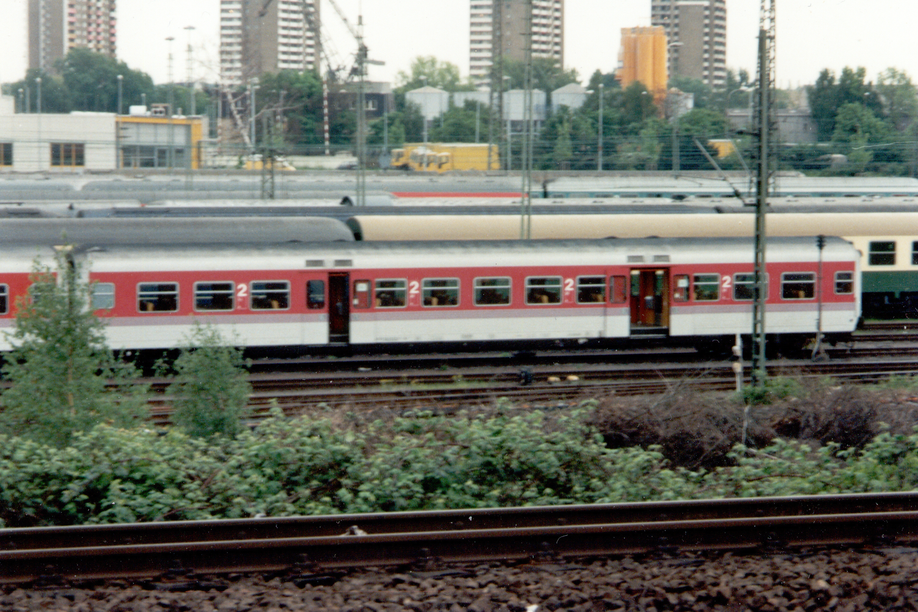 Wagenpark für den nächtlichen IC 922 nach Düsseldorf Flughafen, abgestellt im Vorfeld des Frankfurter Hauptbahnhofs, gebildet aus den umgebauten Nahverkehrswagen-Prototypen von LHB.